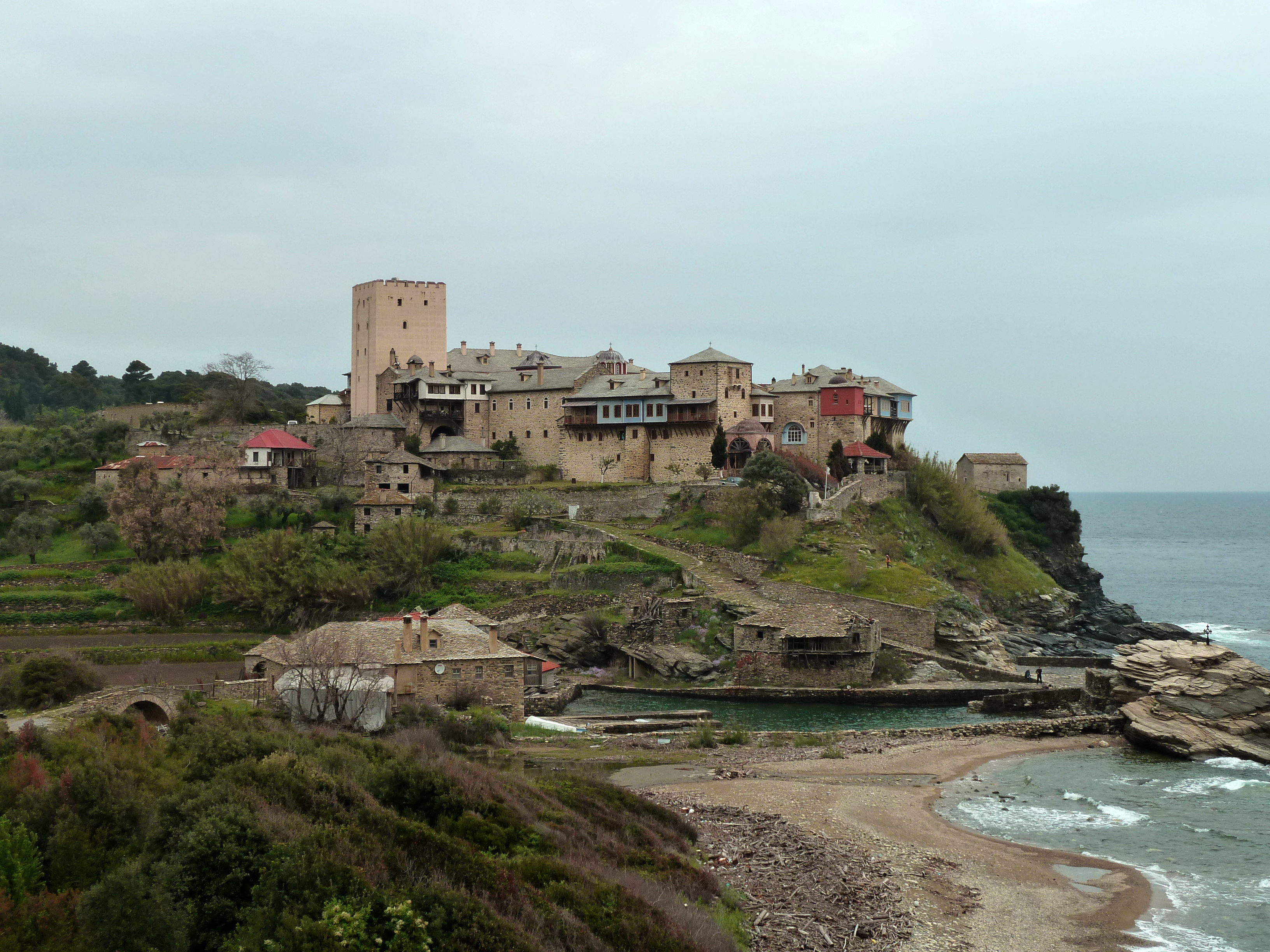 Vue d'ensemble du monastère du Pantokrator (Mont Athos)